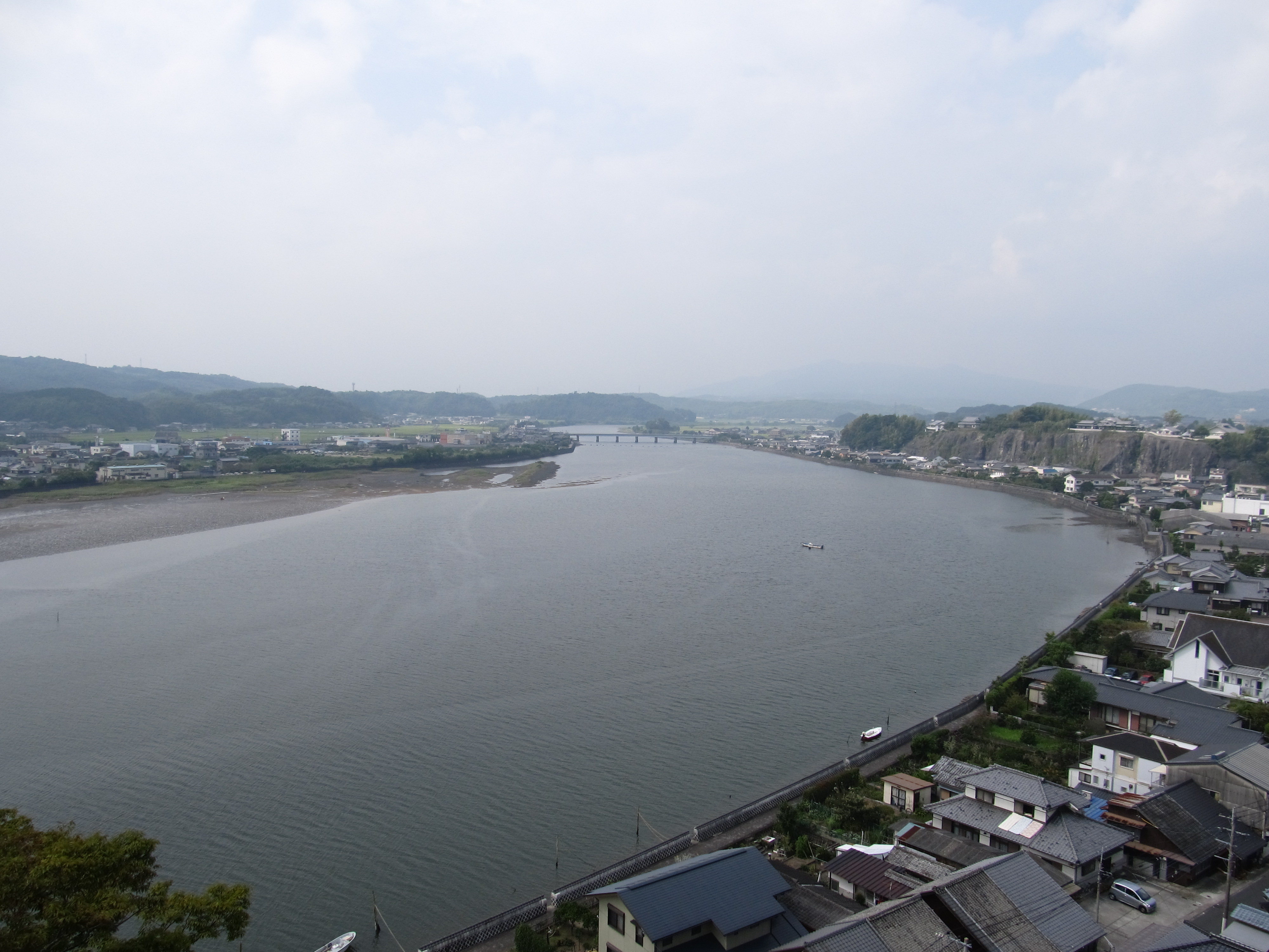 大分県杵築市を流れる八坂川（杵築城跡から上流方向を撮影）。